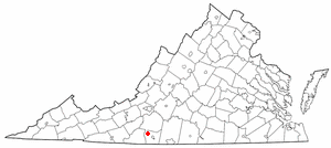 va maps